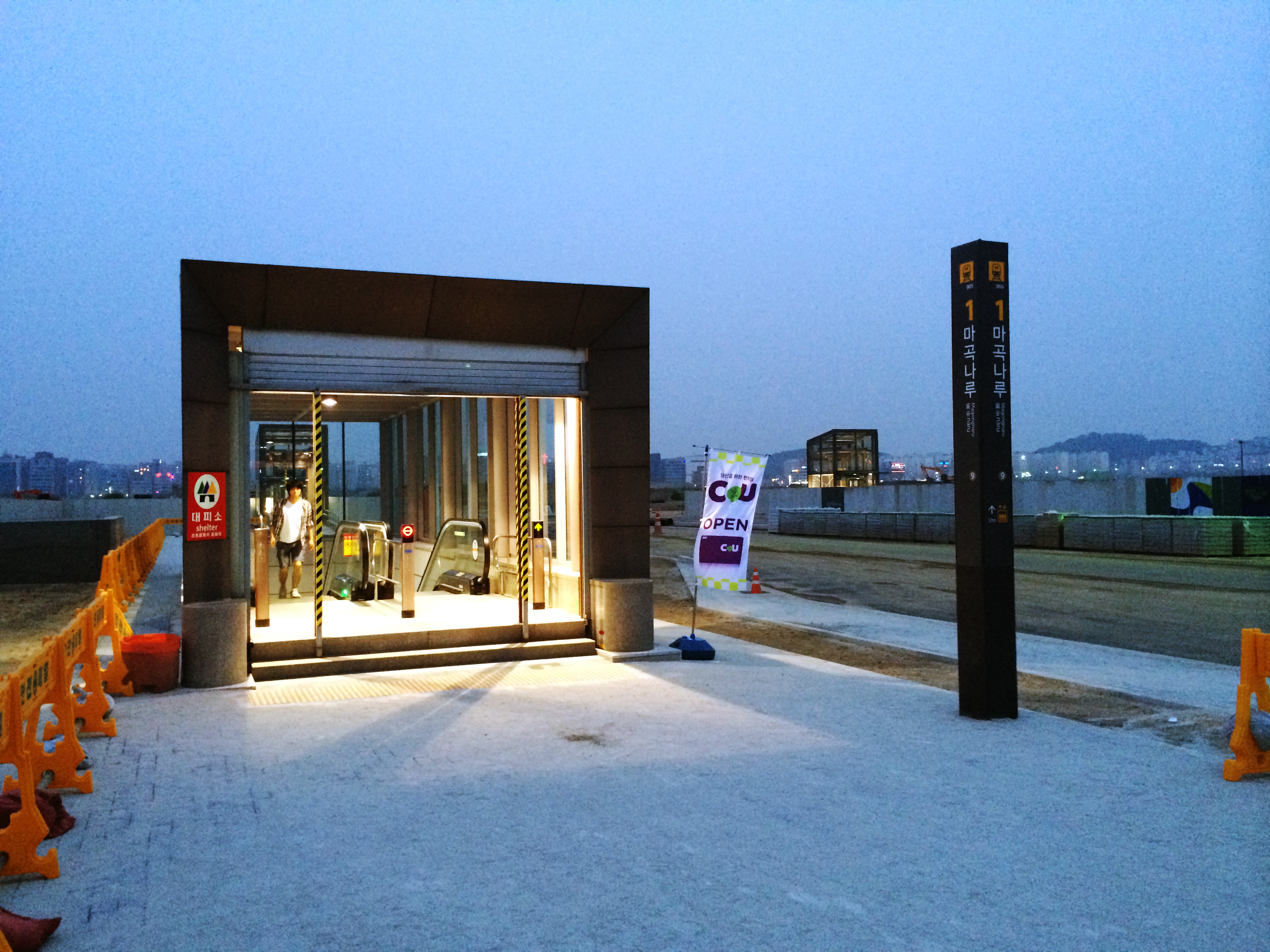 마곡나루역 1번 출입구